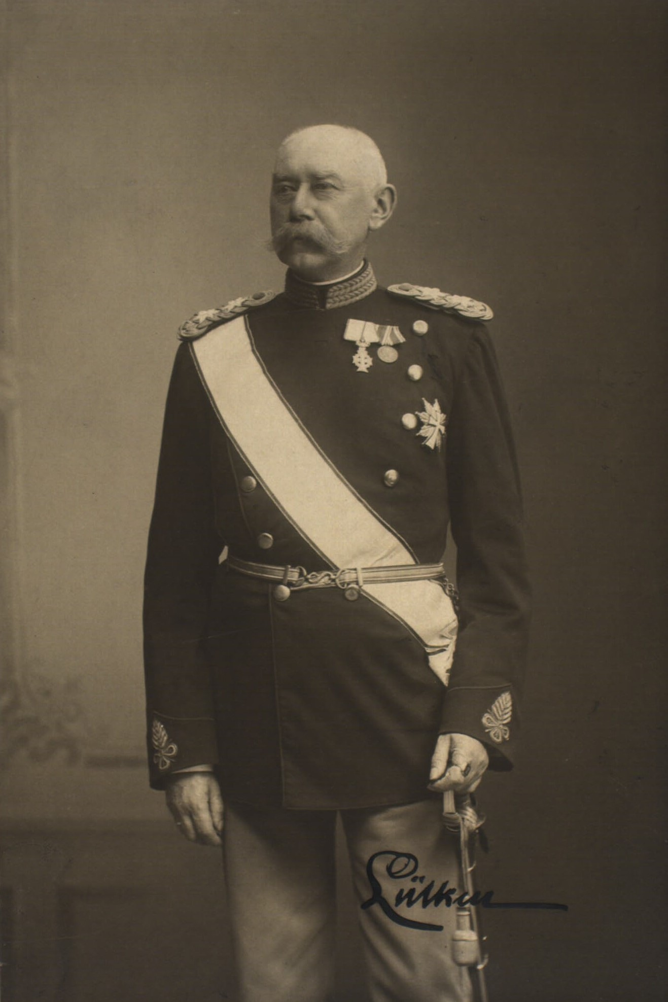 Christian Lütken (1840-1923), Danish General